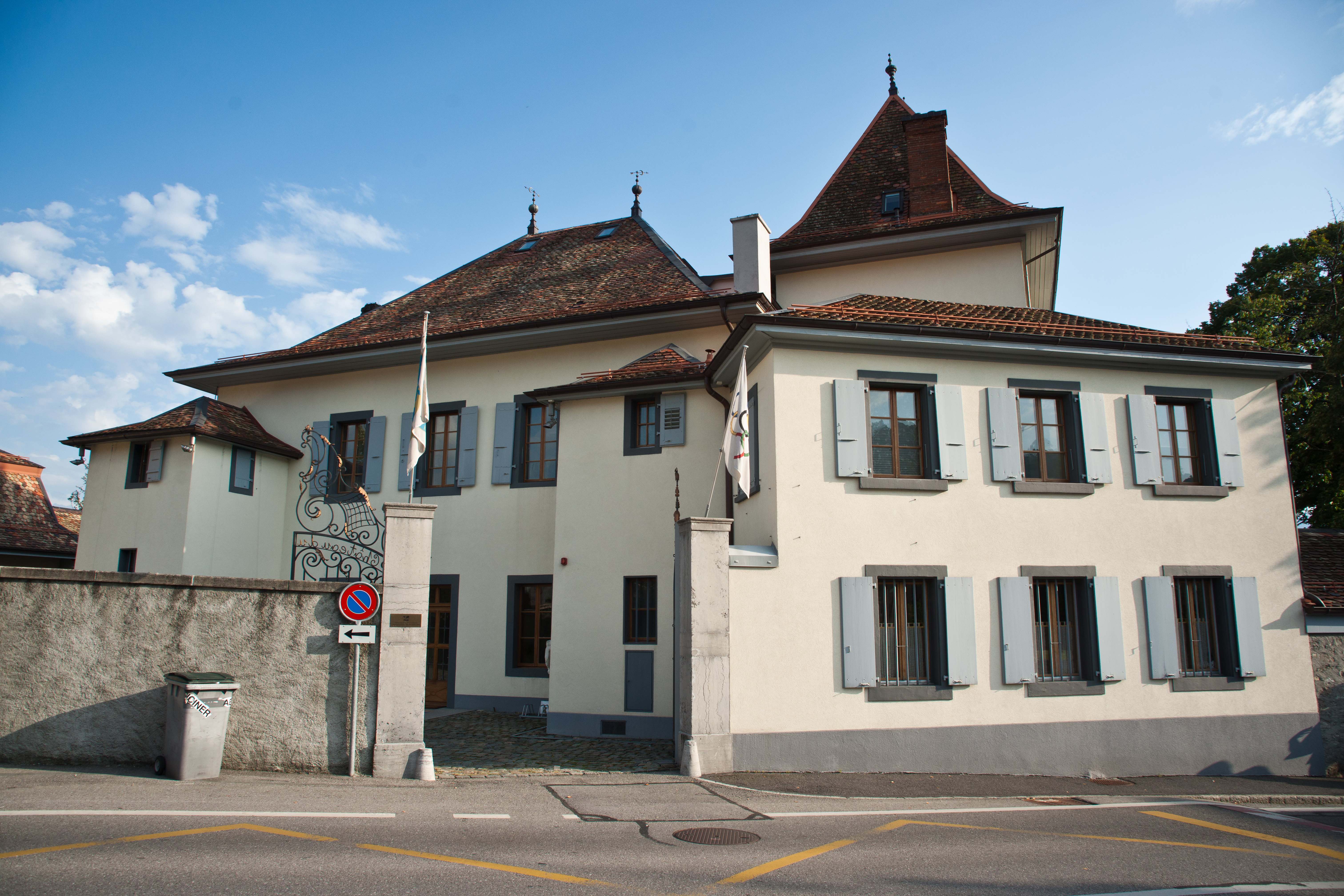 Fédération internationale des luttes associées, locaux.